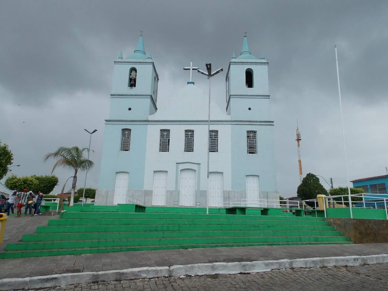 FOTO DA IGREJA MATRIZ DE TRAIPU